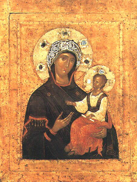 ПеривлептаИкона. Византия.